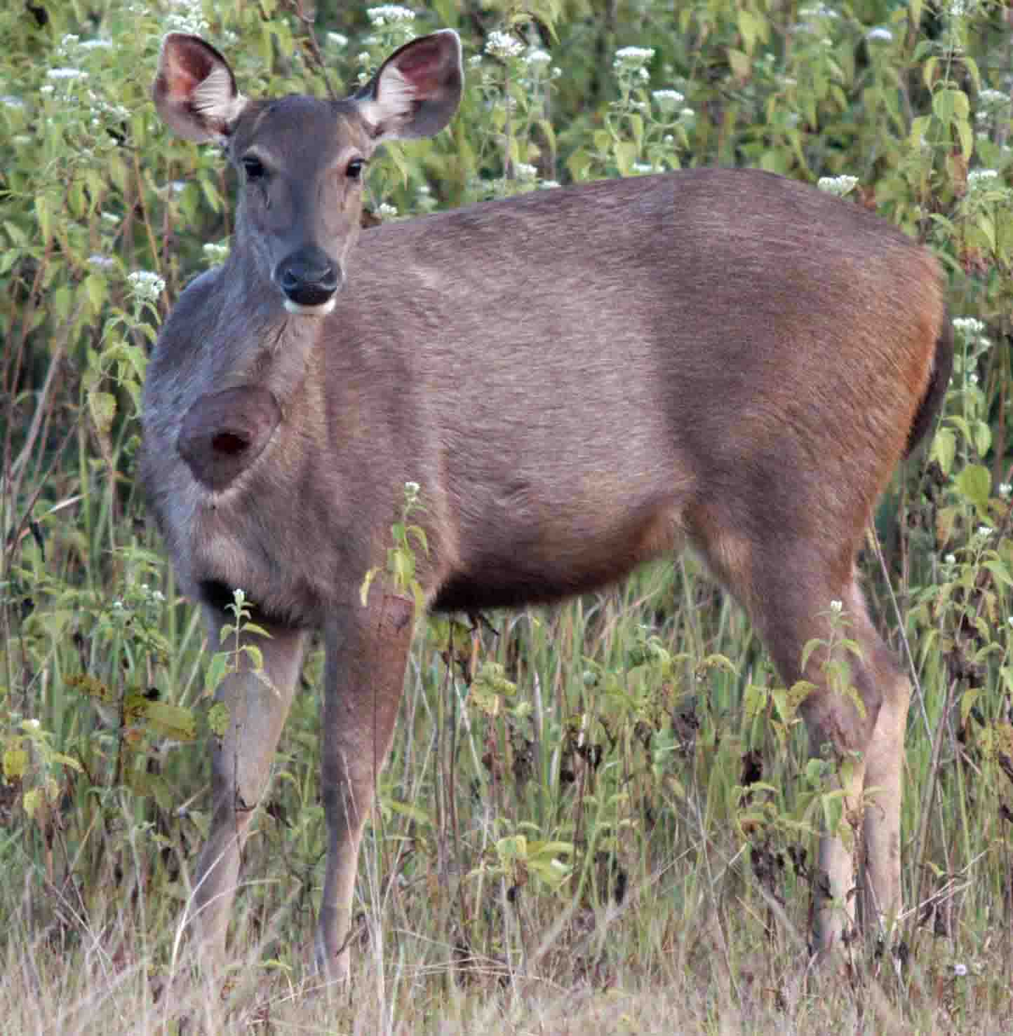 Cerf sambar femelle en liberté, Khao Yai, Thaïlande.L'éruption circulaire sur le cou de l'animal est normale et caractéristique de cette espèce.